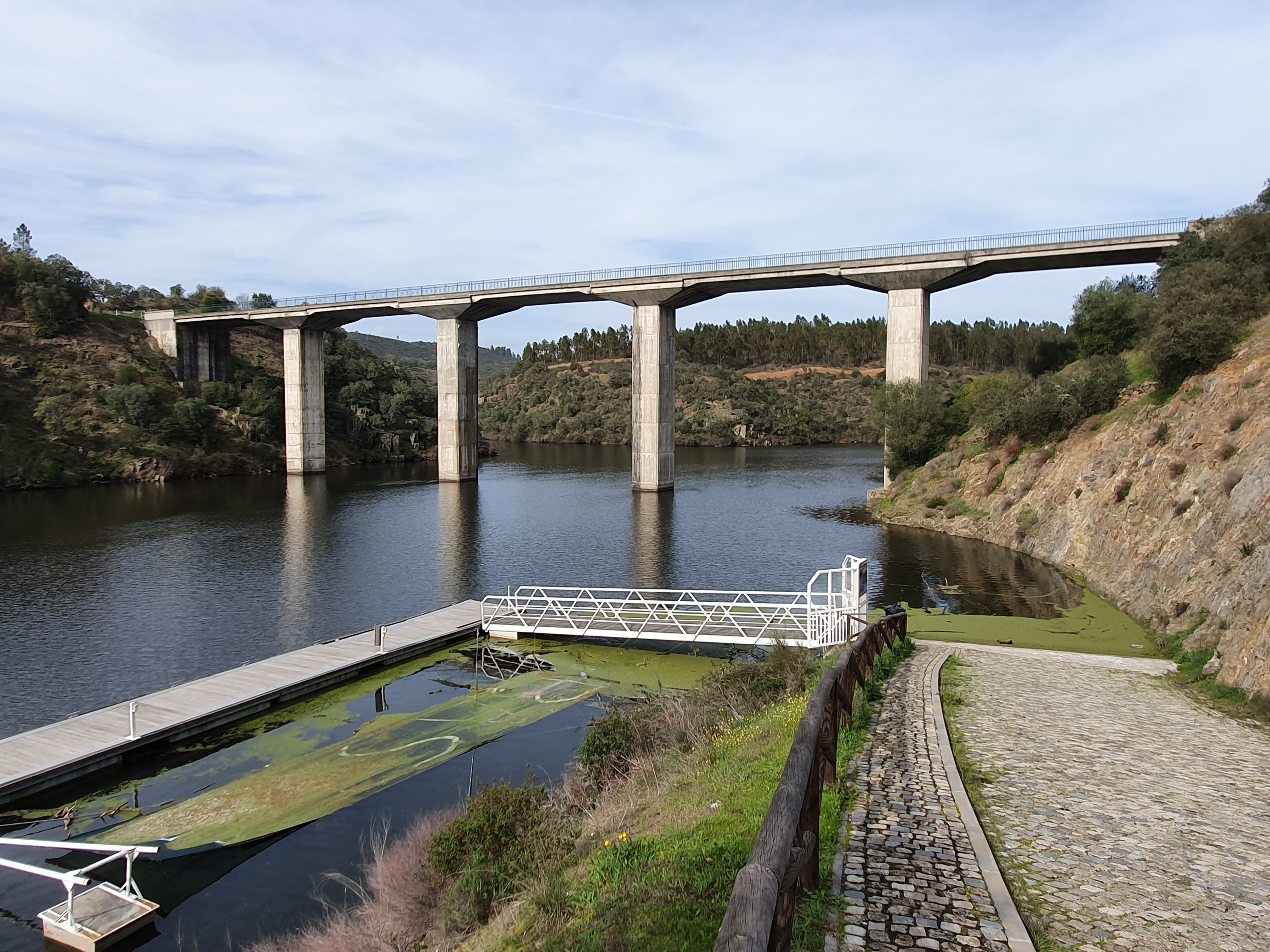 Cais dos Lentiscais